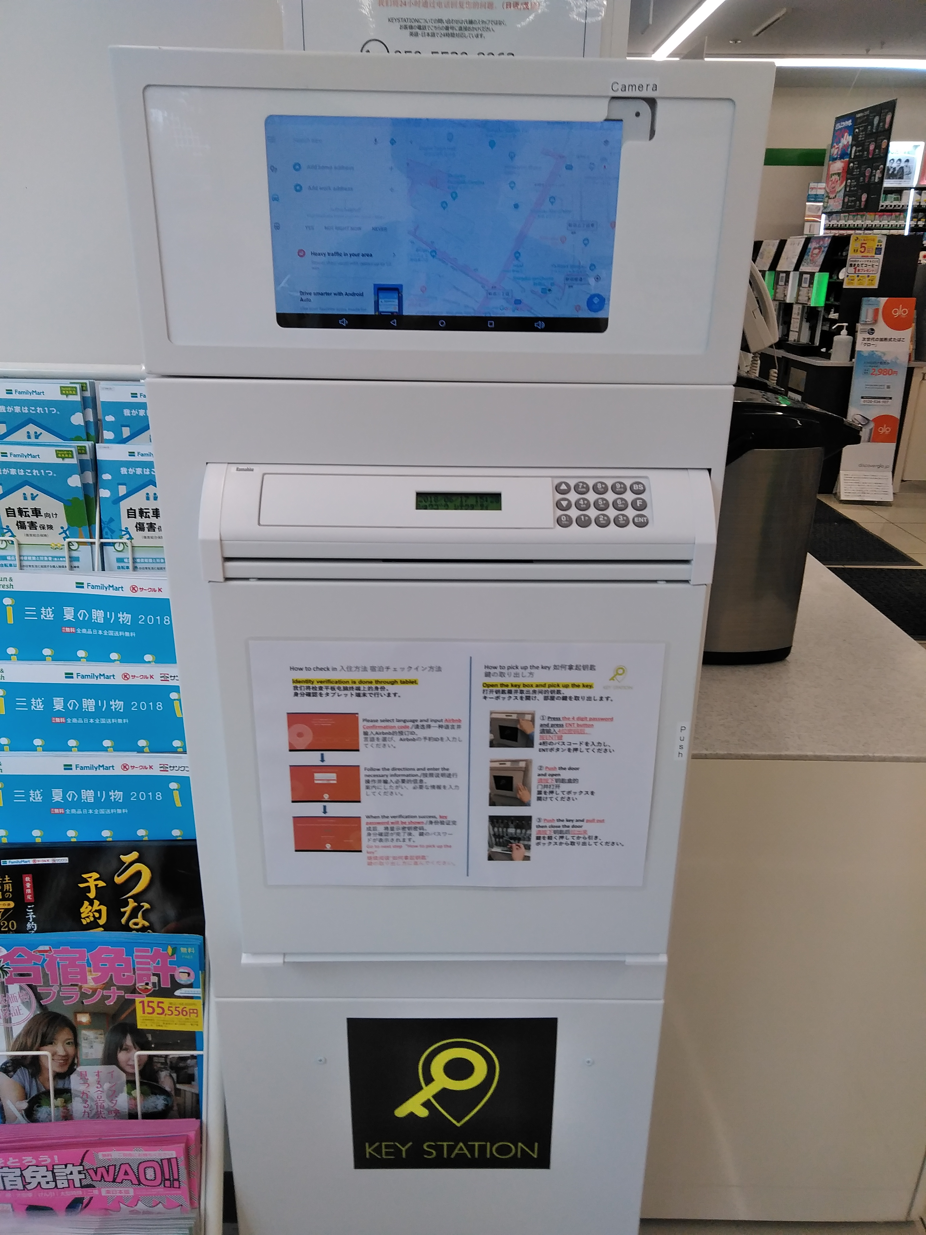 新宿のコンビニ（ファミマ）に設置されている民泊の鍵貸出機